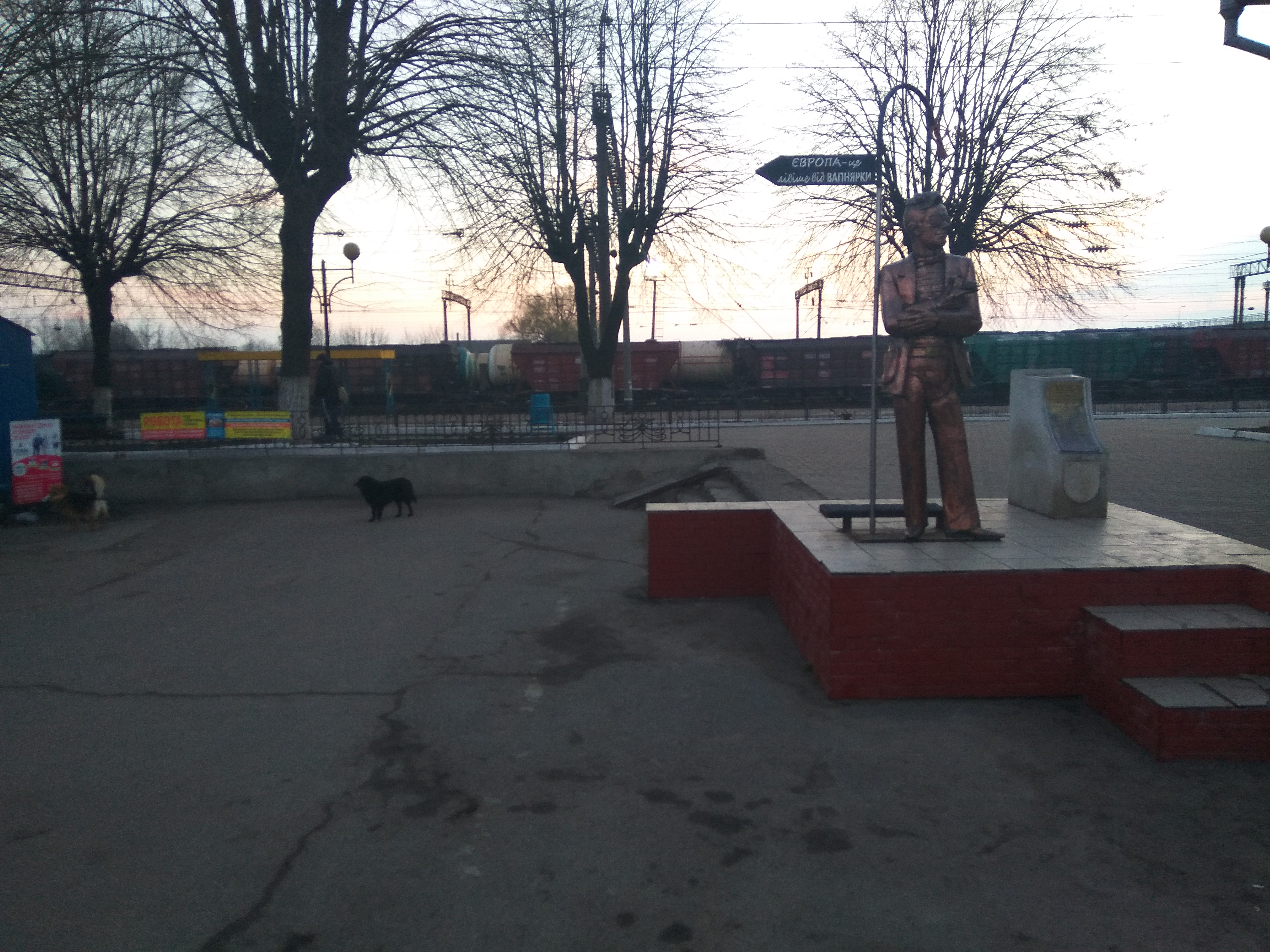 ст. Вапнярка та пам'ятник Євграфу Сідалковському